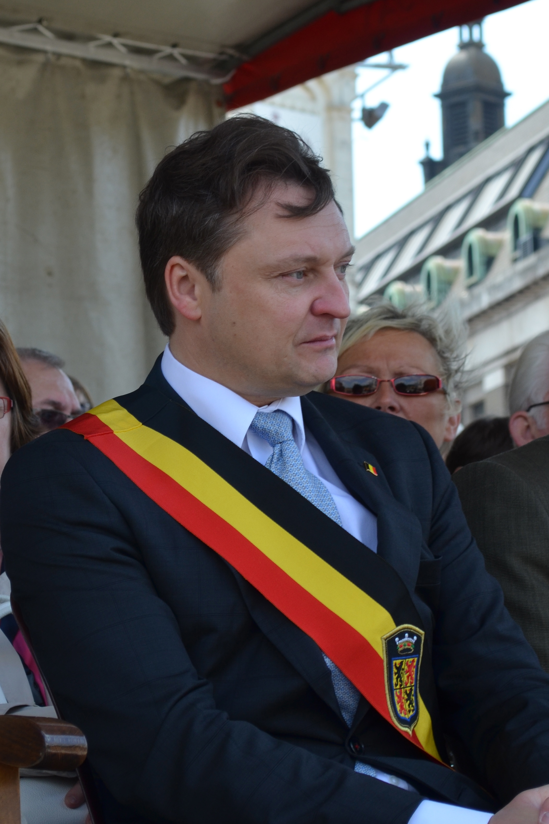 Tommy Leclercq, gouverneur de la province de Hainaut